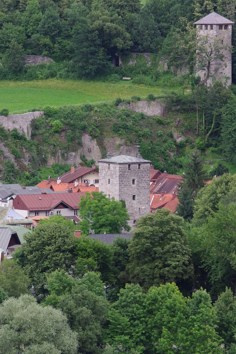 Peter-und-Paul-Turm Bad Reichenhall, Teil der ehemaligen Stadtbefestigung, heute bewohnt und im Privatbesitz. Rechts im Hintergrund der zweite erhaltene Turm, der Pulverturm mit Resten der Stadtmauer. Aufgenommen vom Schroffen aus.